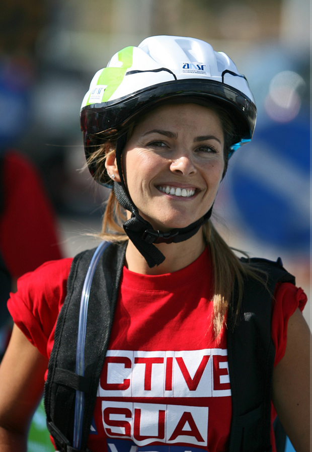 Sónia Araújo at porto bike tour'